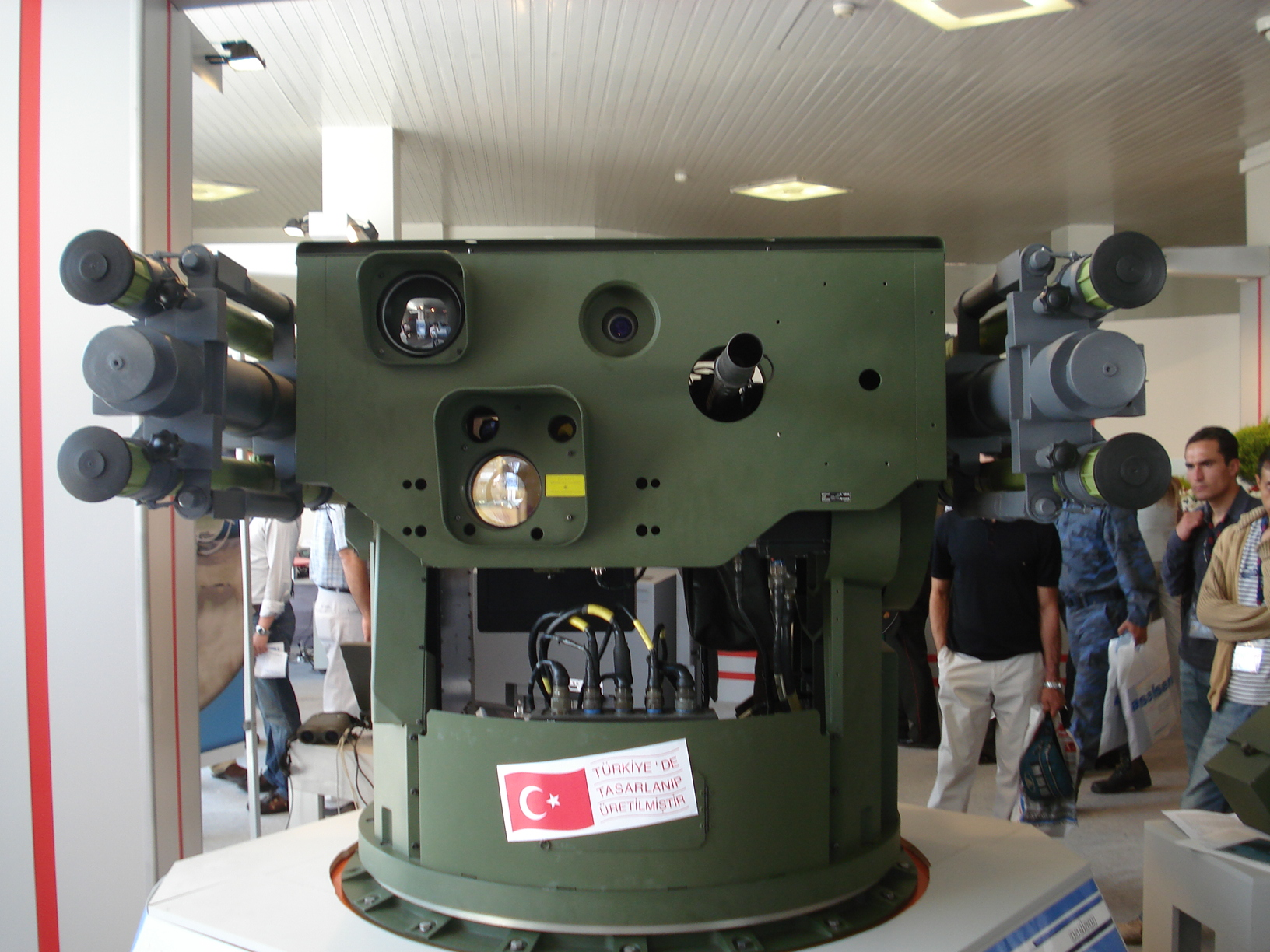 IDEF '07 Savunma Fuarı'nda çekildi.Aselsan zipkin. 23 Mayıs 2007